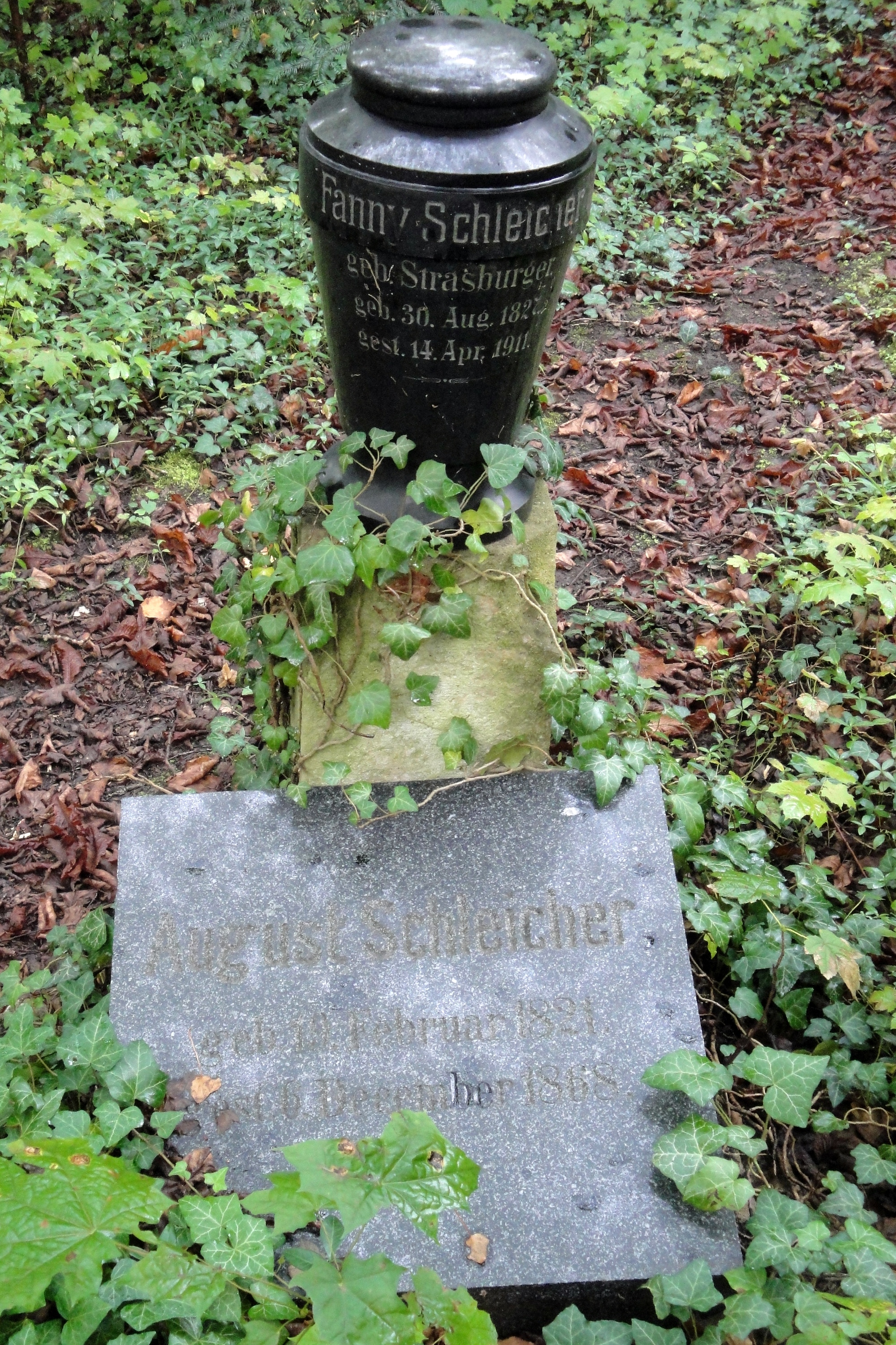 Grab von August Schleicher auf dem Johannisfriedhof in Jena